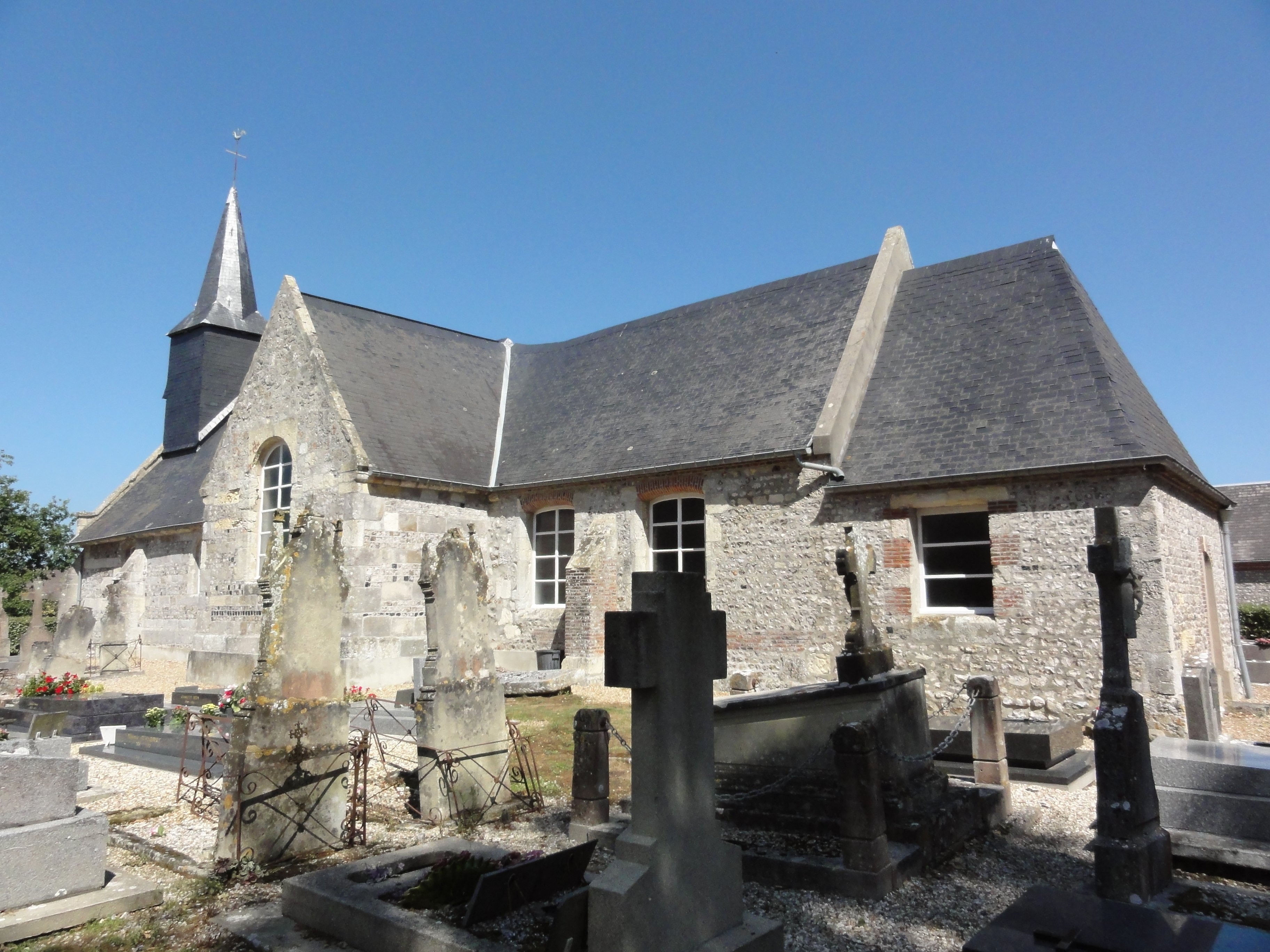 Écretteville-sur-Mer (Seine-Mar.) église